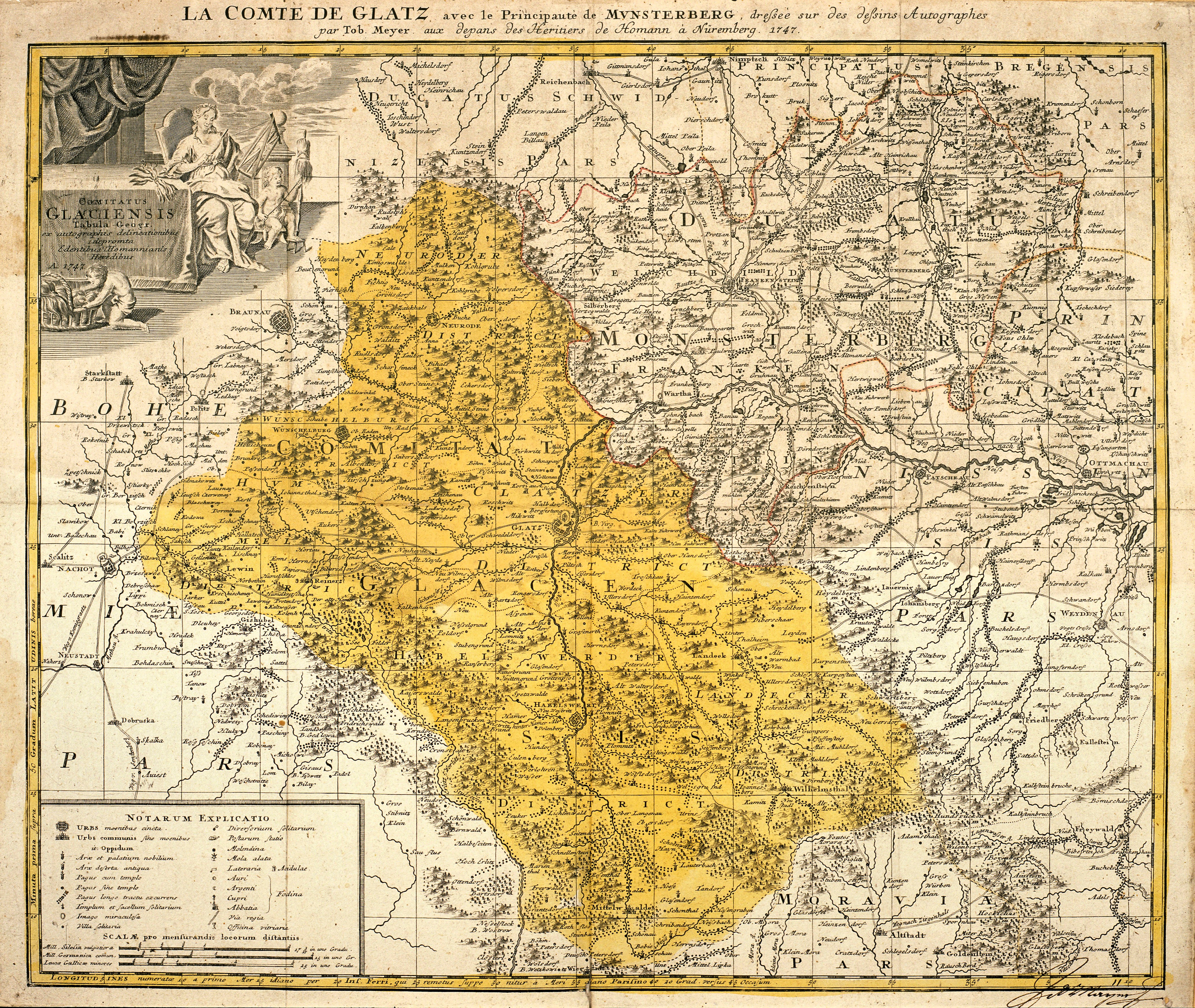 Ausschnitt aus der Landkarte Comitatus Glaciensis